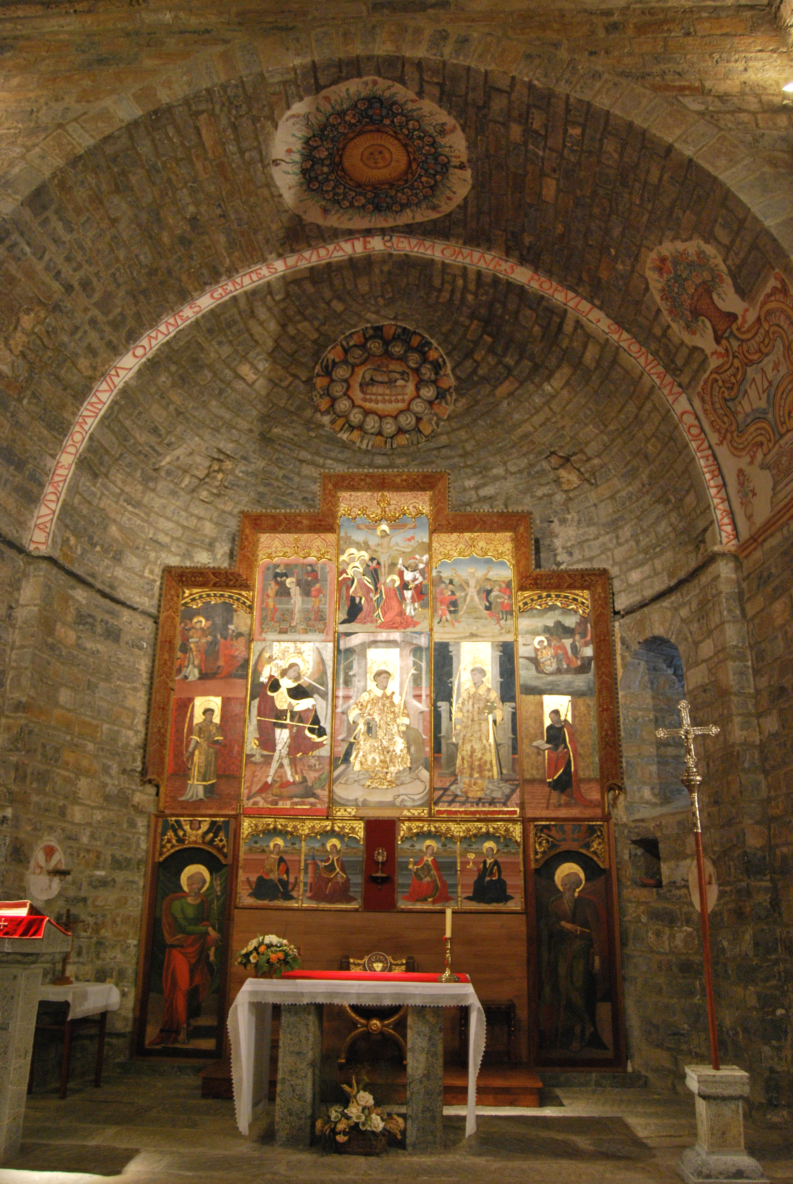 Retablo gótico del siglo XV dedicado a San Vicente